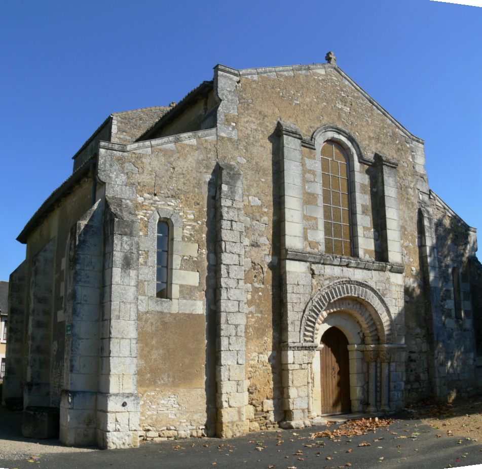 Église Saint-Pierre de Frontenay-sur-Dives